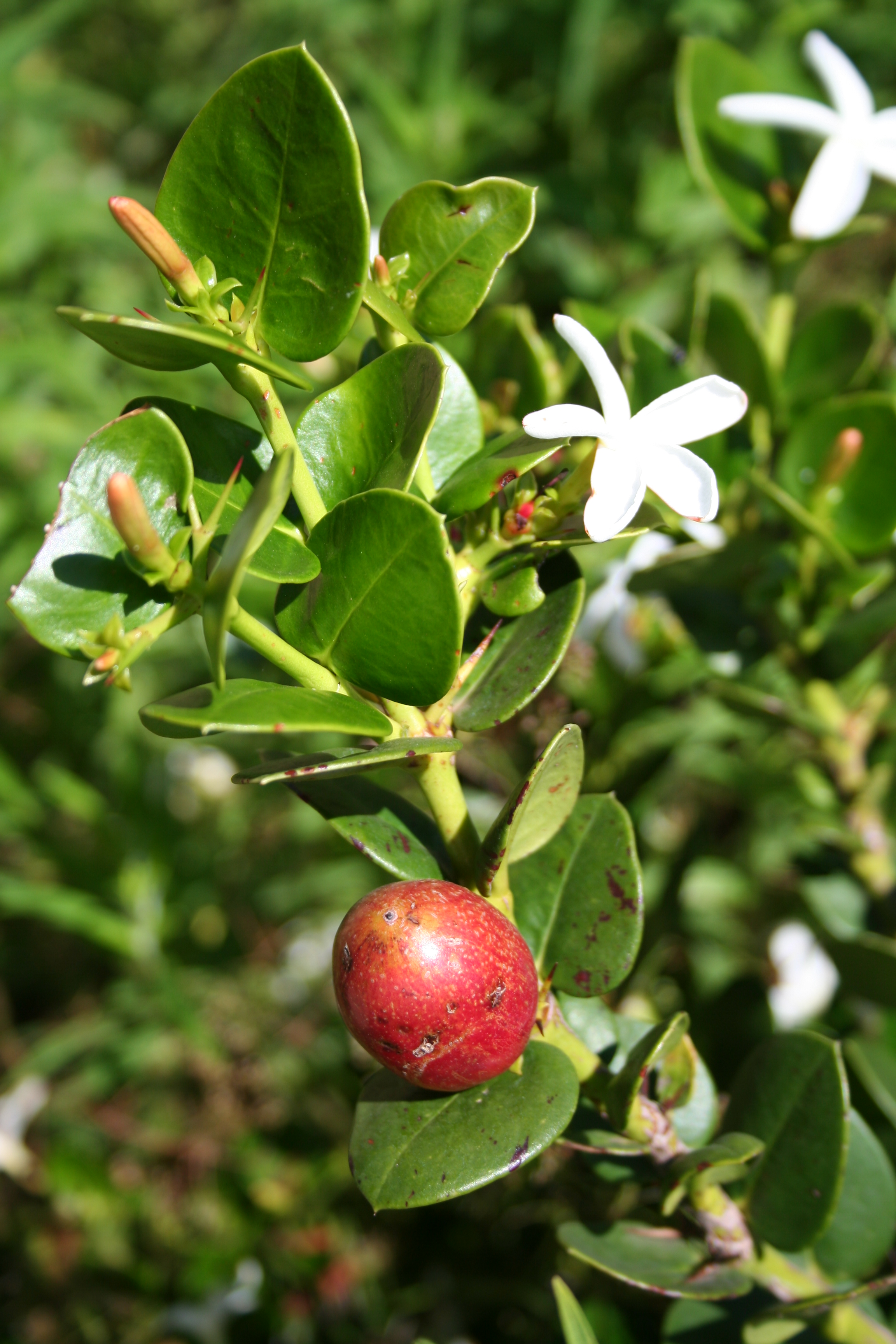 Carissa macrocarpa, W.Sisulu Bot. Garden